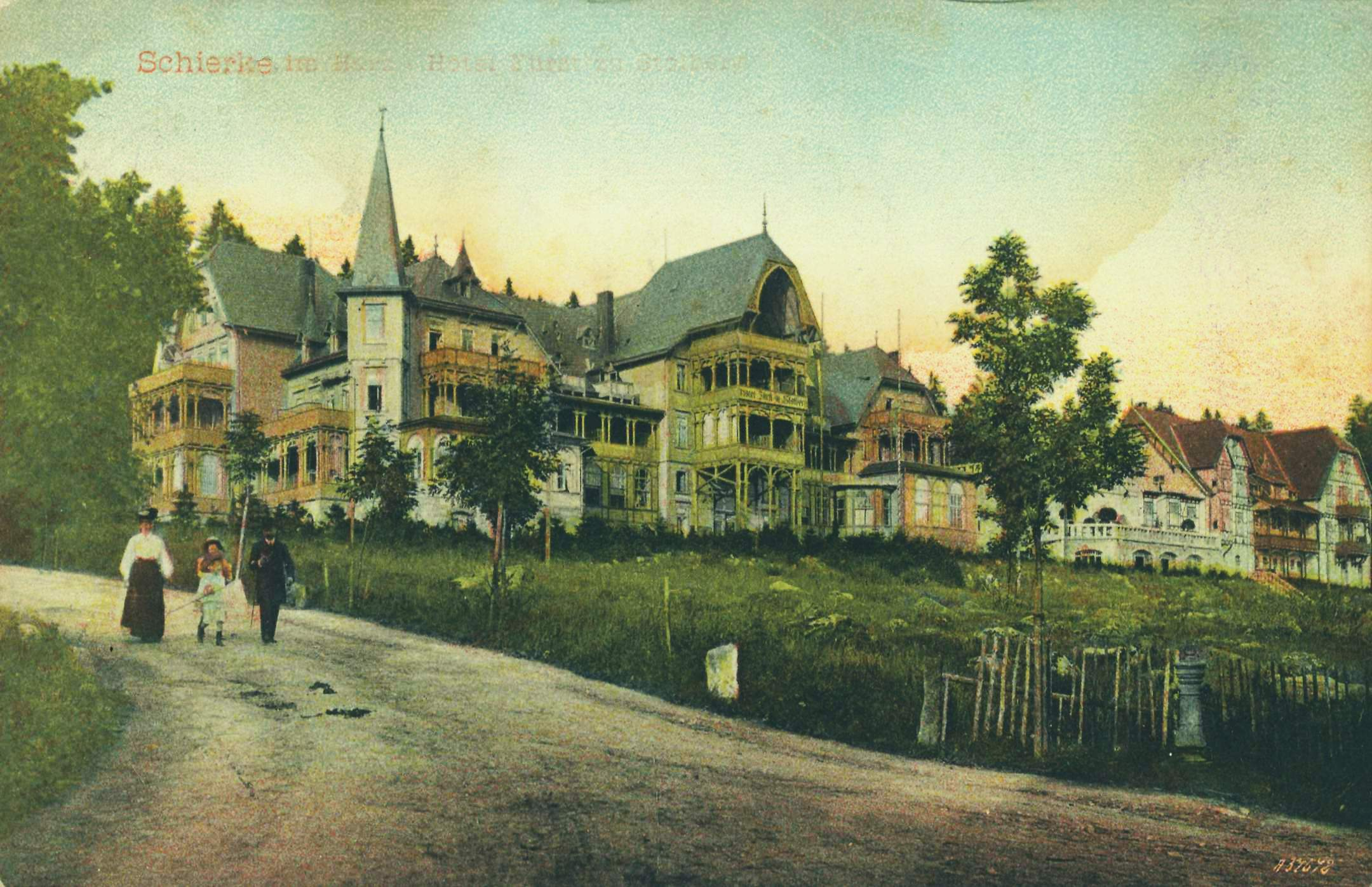 Schierke, Hotel Fürst zu Stolberg